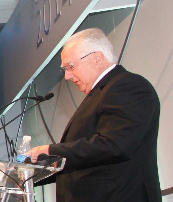 Horst Paulmann en la 48ª Convención ABRAS.